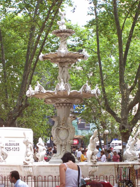 Fuente en la Plaza Matriz de Montevideo, barrio de Ciudad Vieja, Uruguay